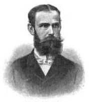 Der deutsche Zoologe Carl Apstein (1862-1950).